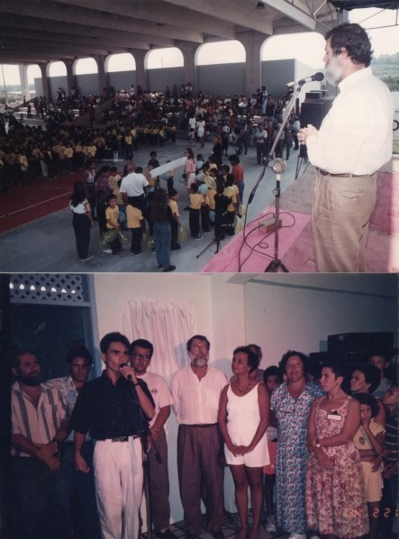 Na primeira imagem, o então prefeito José Bonifácio discursa para alunos. Na segunda, conversa com professores.